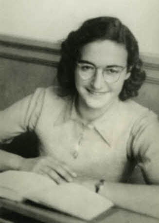 Margot Frank op het Joods lyceum achter de schoolbank